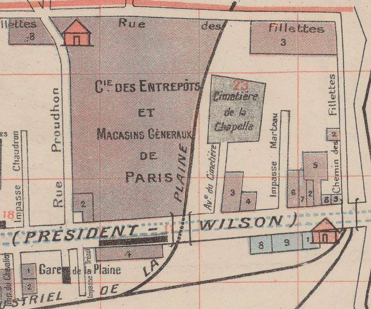 Saint-Denis.Cimetière de la Chapelle.1920.Bibliotheque Nationale de France